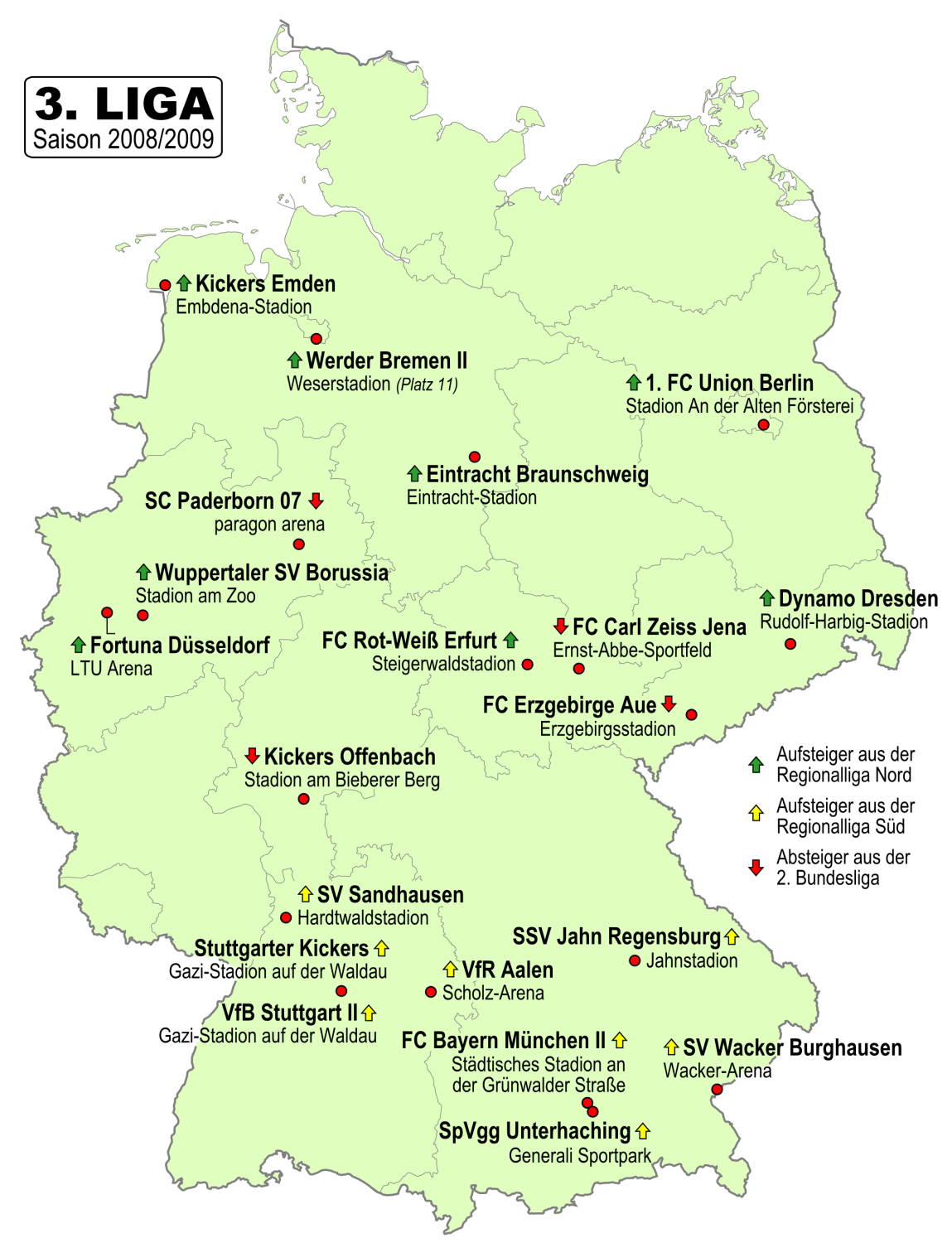 Karte der Vereine der 3. Liga 2008/2009